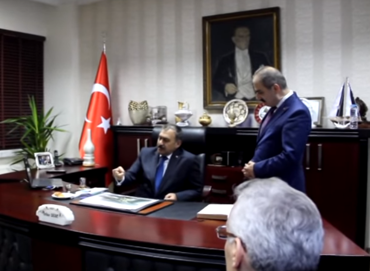 Bakan Veysel Eroğlu çalışma ofisinde.